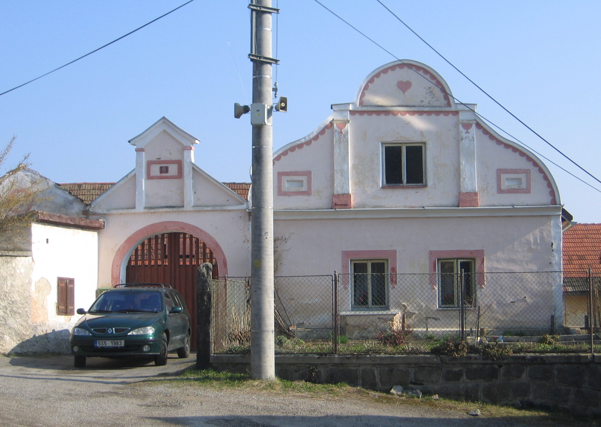 Venkovská usedlost (Starov), Starov 8